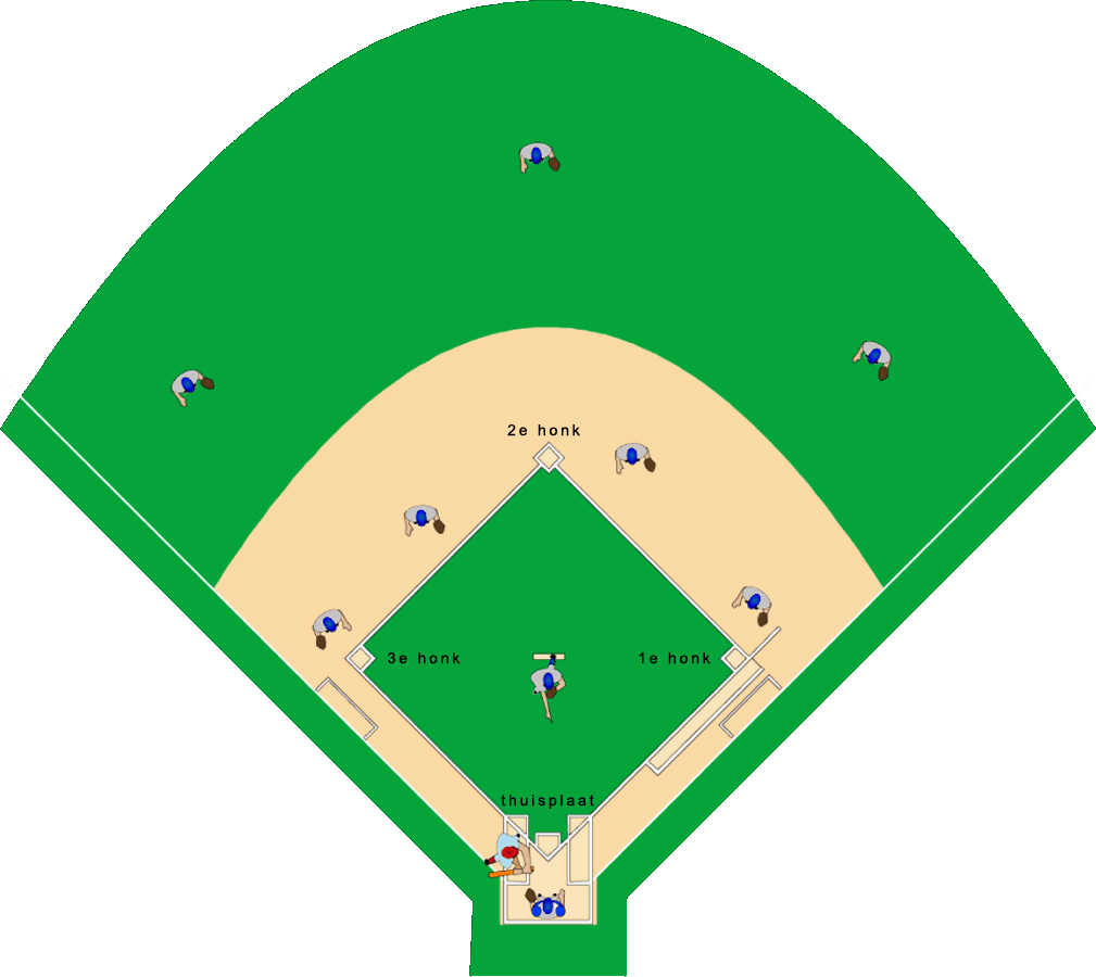 honkbalveld